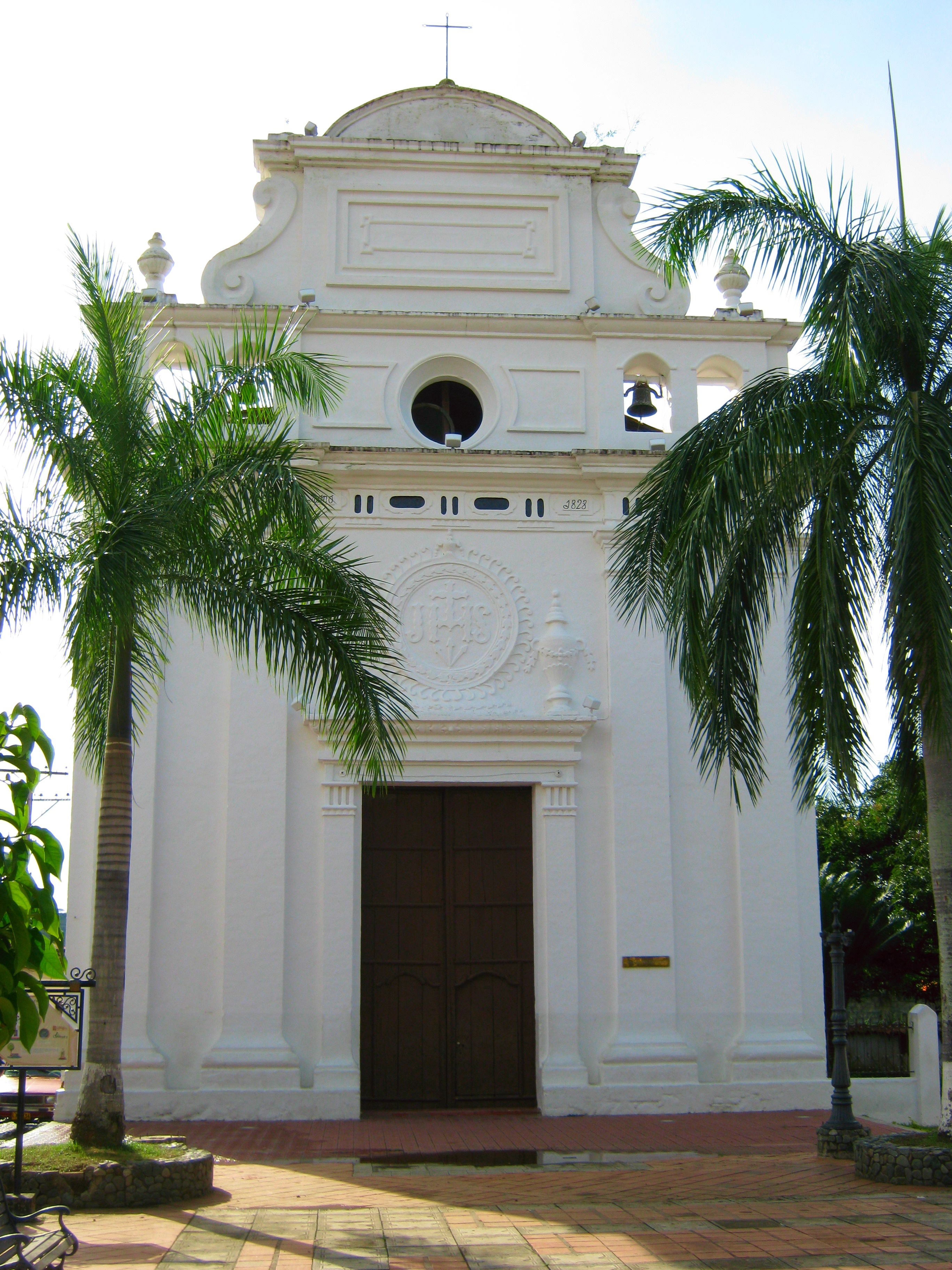 Iglesia de Jesús Nazareno en Santa Fe de Antioquia, colombia.